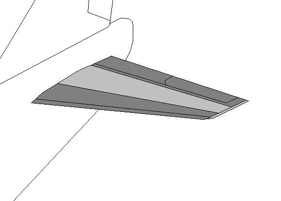 水平尾翼のイラスト